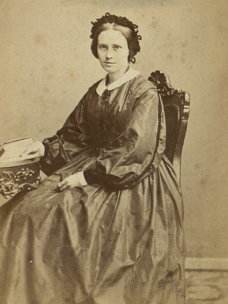 Mathilde Fibiger af fotograf Thora Hallager (1821-1884)